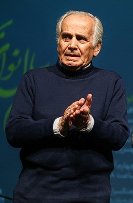 رحمت افشار در سومین سال نوای موسیقی ایران - ۴ آذر ۱۳۹۶ فرهنگسرای نیاوران